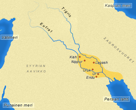 Sumerin kartta